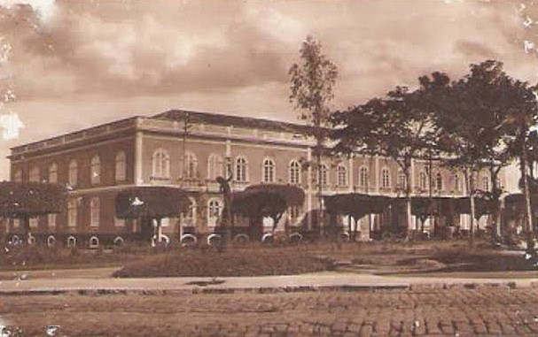 Palácio Provincial de Manaus no século XIX.